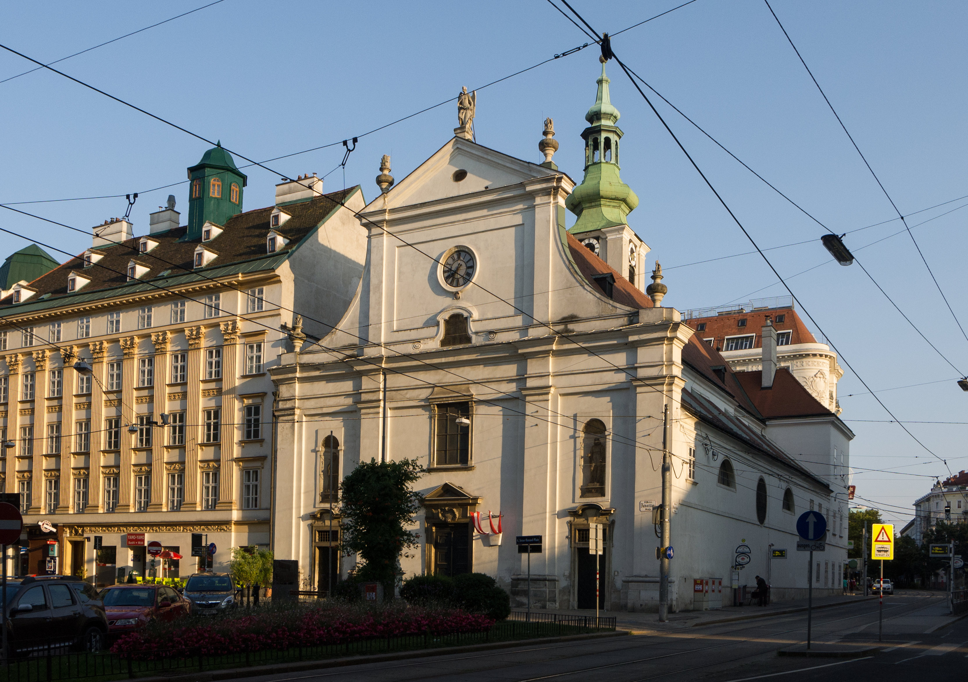 Paulanerkirche, Pfarrkirche zu den Hl. Schutzengeln